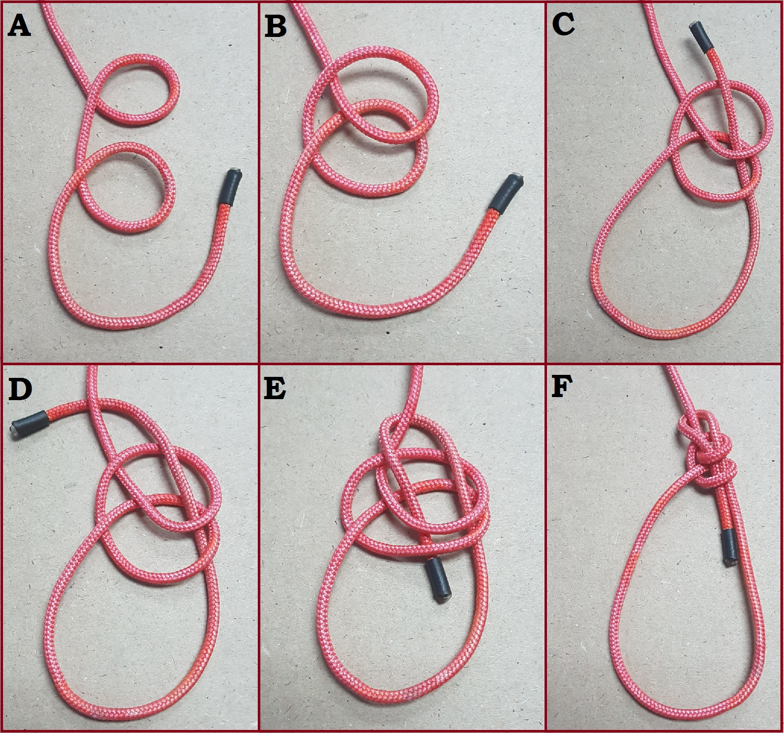 Foto vir metode om 'n Dubbele Water Bowlineknoop te knoop.